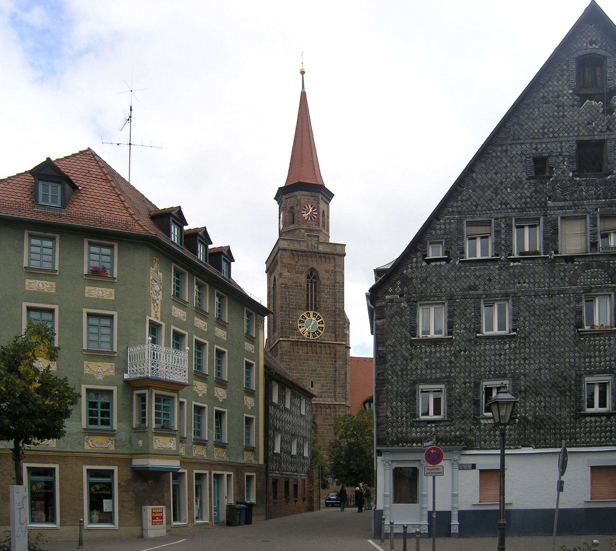 Fürther Michaeliskirche